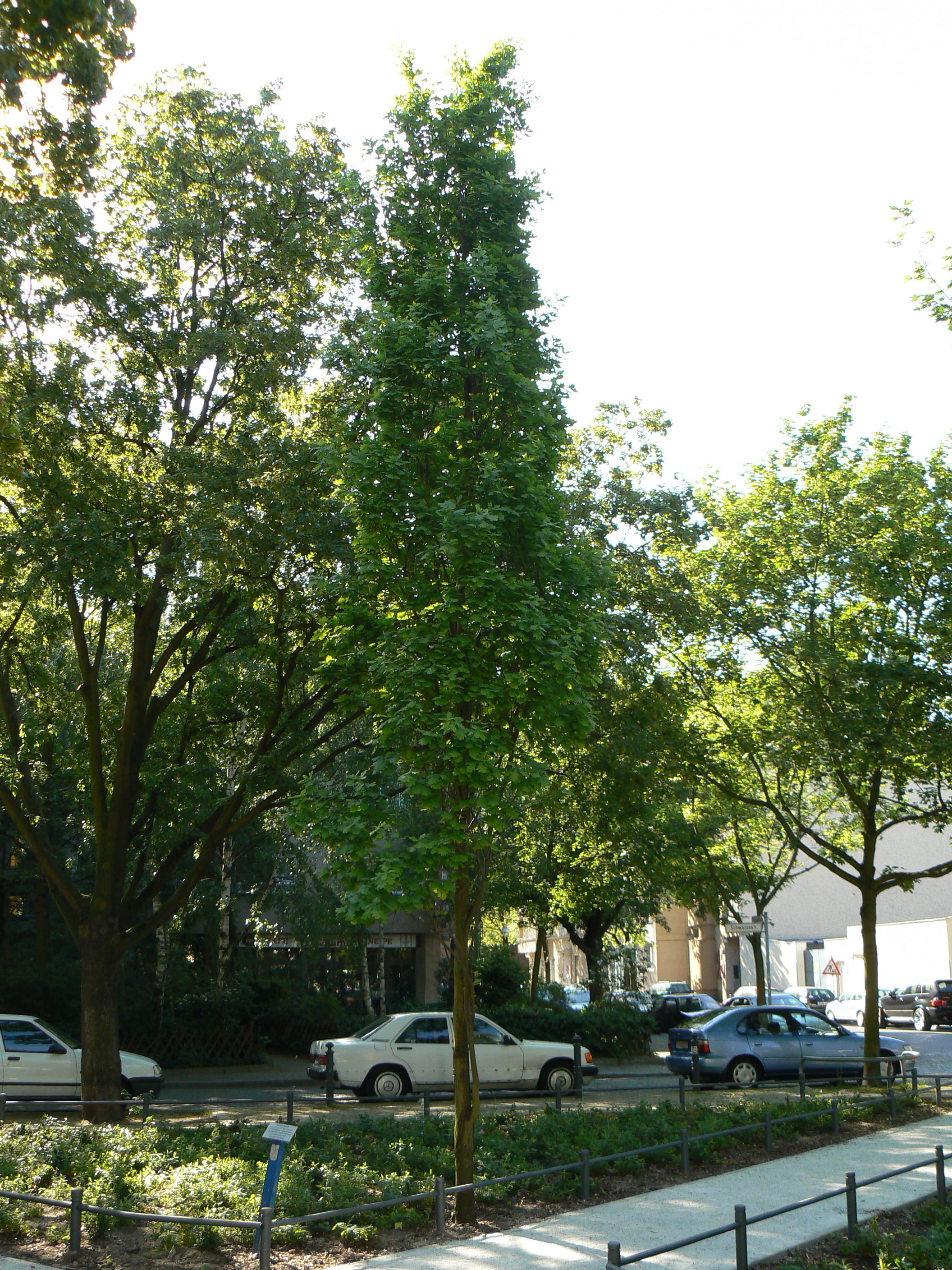 Zamenhofeiche auf dem Esperantoplatz in Berlin-Neukölln, Inschrift der Tafel: „Zamenhof-Eiche Gepflanzt am 14. April 1992 zum 75. Todestag des Begründers der internationalen Sprache Esperanto Dr. Ludwig Zamenhof Esperantoliga Berlin“